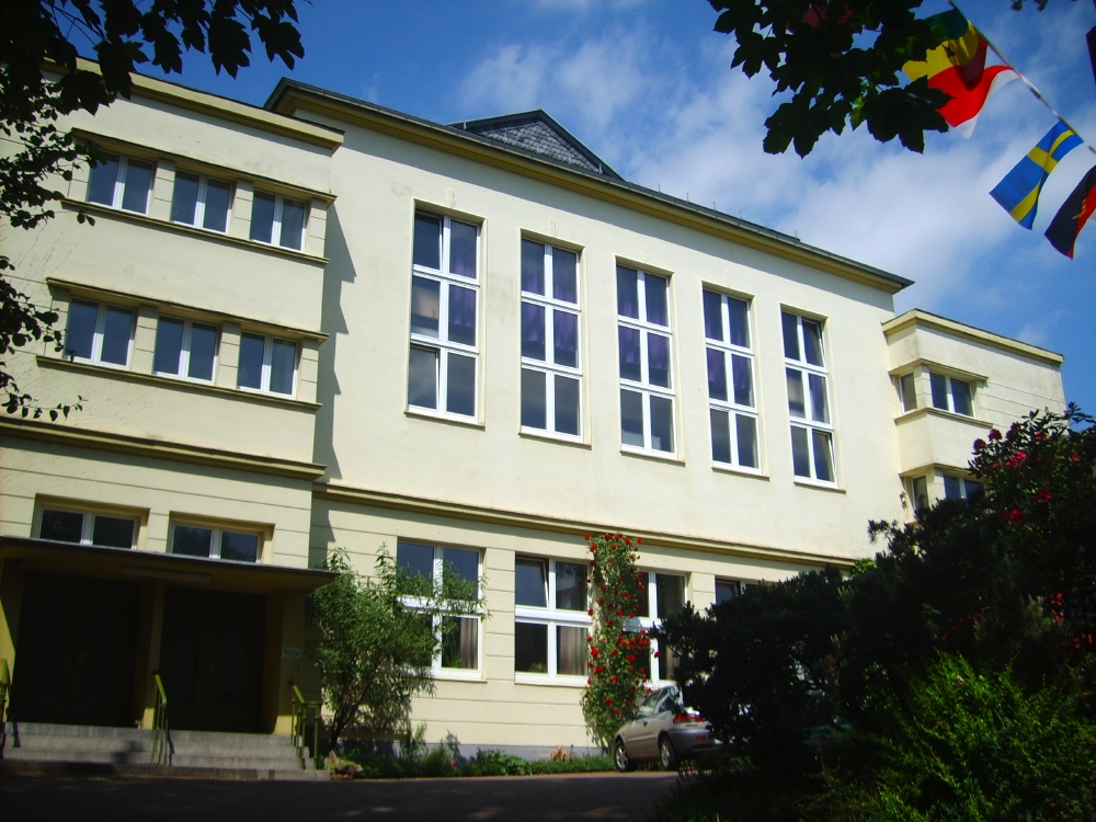 Brüdergemeinde Baustraße, Wuppertal, Germany